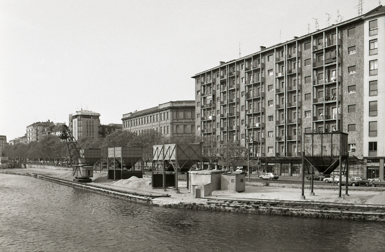 Servizio fotografico : Milano, 1980 / Paolo Monti. - Strisce: 5, Fotogrammi complessivi: 26 : Negativo b/n, gelatina bromuro d'argento/ pellicola ; 35 mm. - ((Sul portanegativi: N[I]K[MA]T-EL e iscrizione didascalica e documentaria manoscritta a pennarello nero e rosso "[...] Porta Ticinese (2-27) - Affreschi politici". - All'interno del portanegativi: la serie è anche identificata da una linea orizzontale a pennarello nero che separa la suddetta serie dalla successiva di soggetto diverso. - Fonte: Agenda di Paolo Monti: Nikon Leika 3001-/ Monti 1978 (1978-1982), presso Archivio Paolo Monti